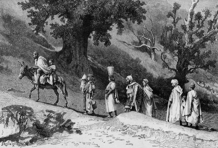 Nomadisme d'une famille Kabyle, en Algérie. 1887.